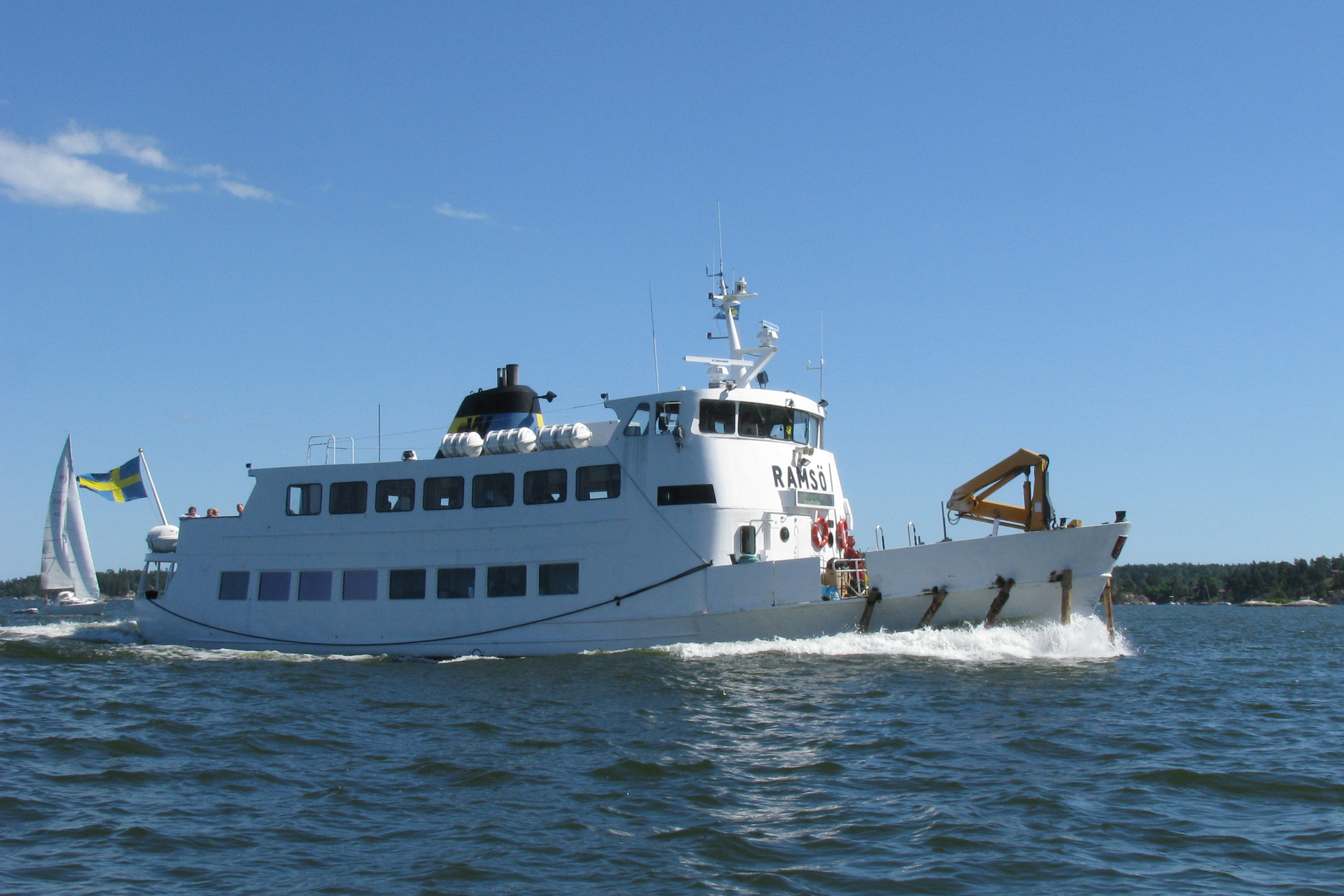 Waxholmsfärjan Ramsö på Västra Saxarfjärden. Källa: eget foto, fotograf EnDumEn 27 juni 2010.